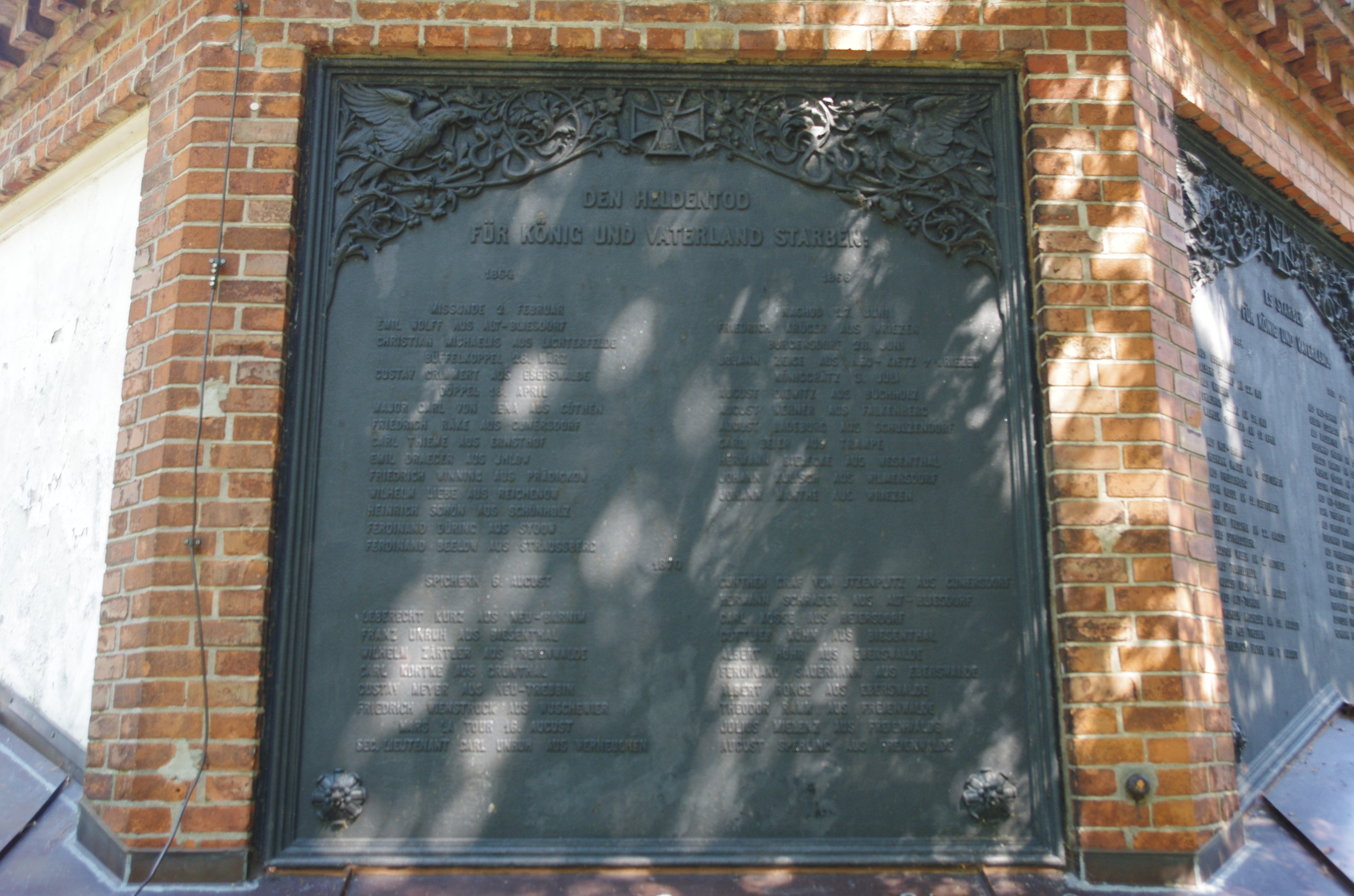 Bad Freienwalde (Oder) in Brandenburg. Der Turm auf dem Galgenberg steht unter Denkmalschutz. Es ist ein Kriegerdenkmal und erinnert an die Kriege im 19. Jahrhundert.